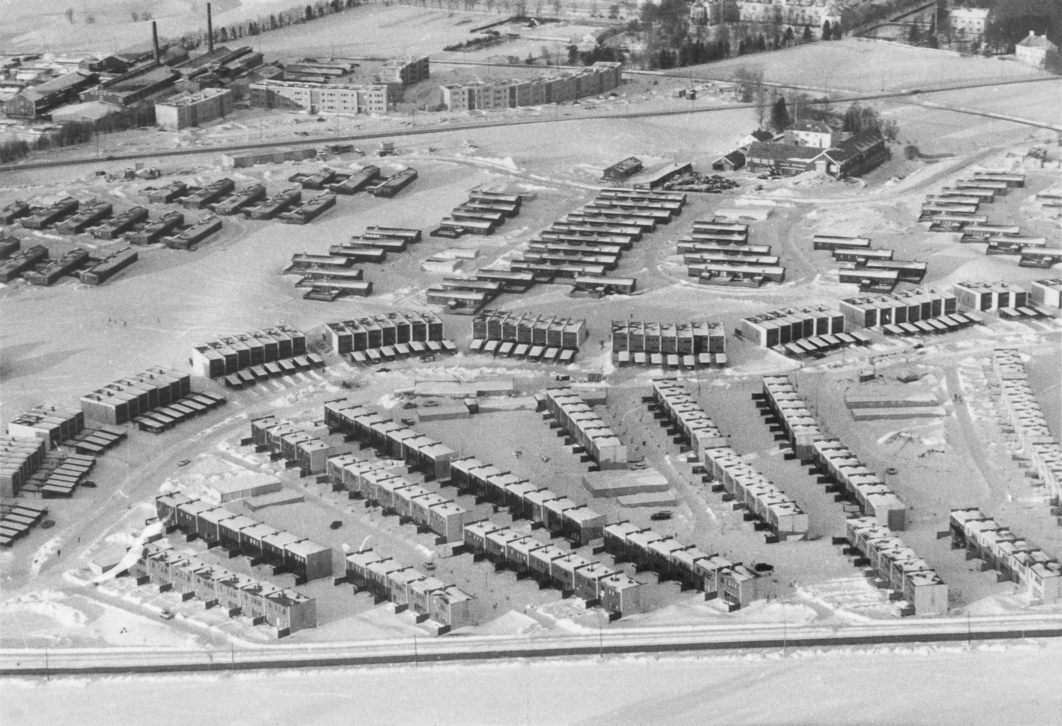 Flyfoto av Angeltrøa boligfelt. I forgrunnen Jonsvannsveien foran et stort byggefelt. Bak til venstre med to store piper ser vi gamle teglverket på Strinda, foran fabrikken går Omkjøringsveien (E6). Bak til høyre i bildet er Angelltrøa gård, bak den krysser Granåsveien med Omkjøringsveien. Vinterbilde.